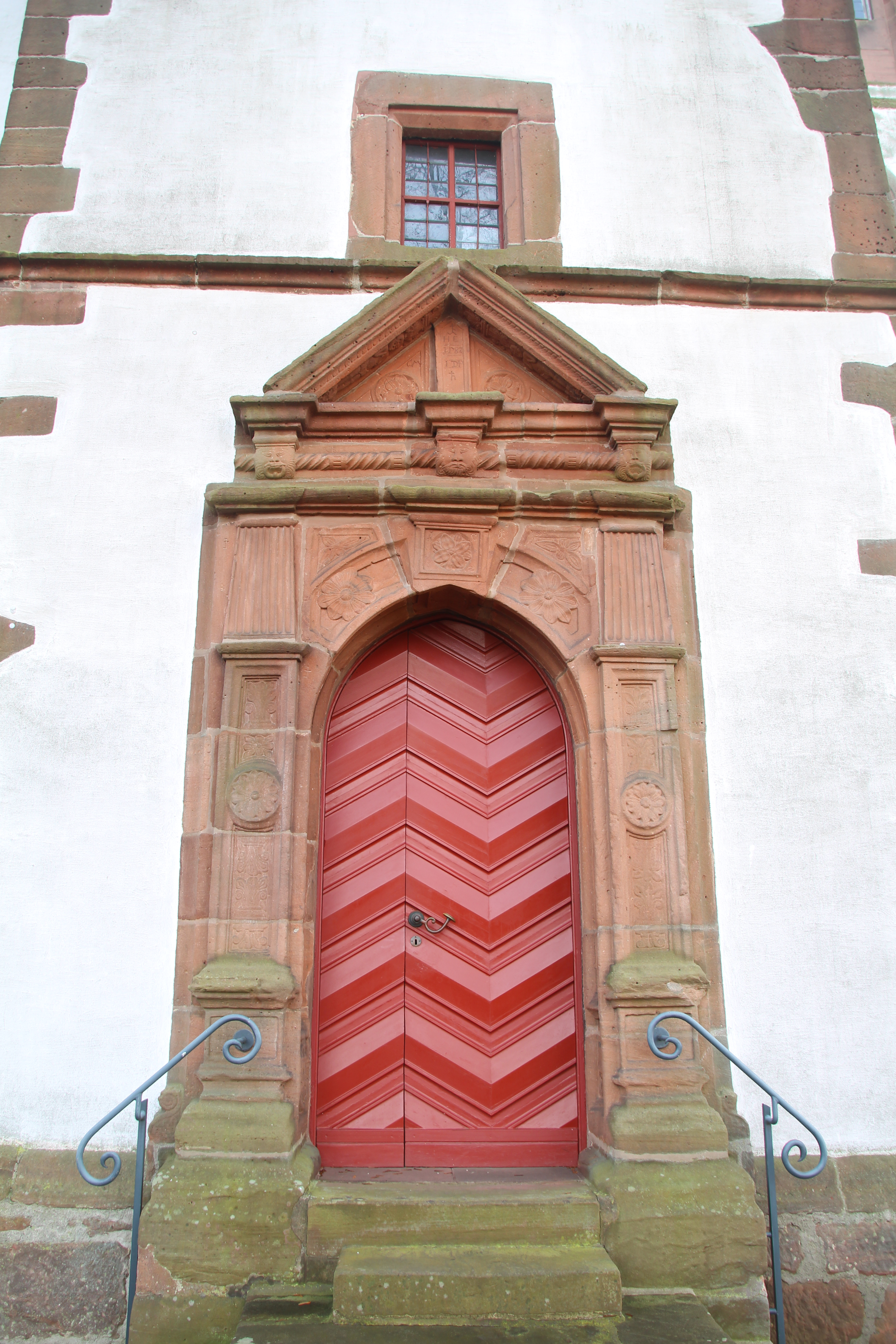 Westportal